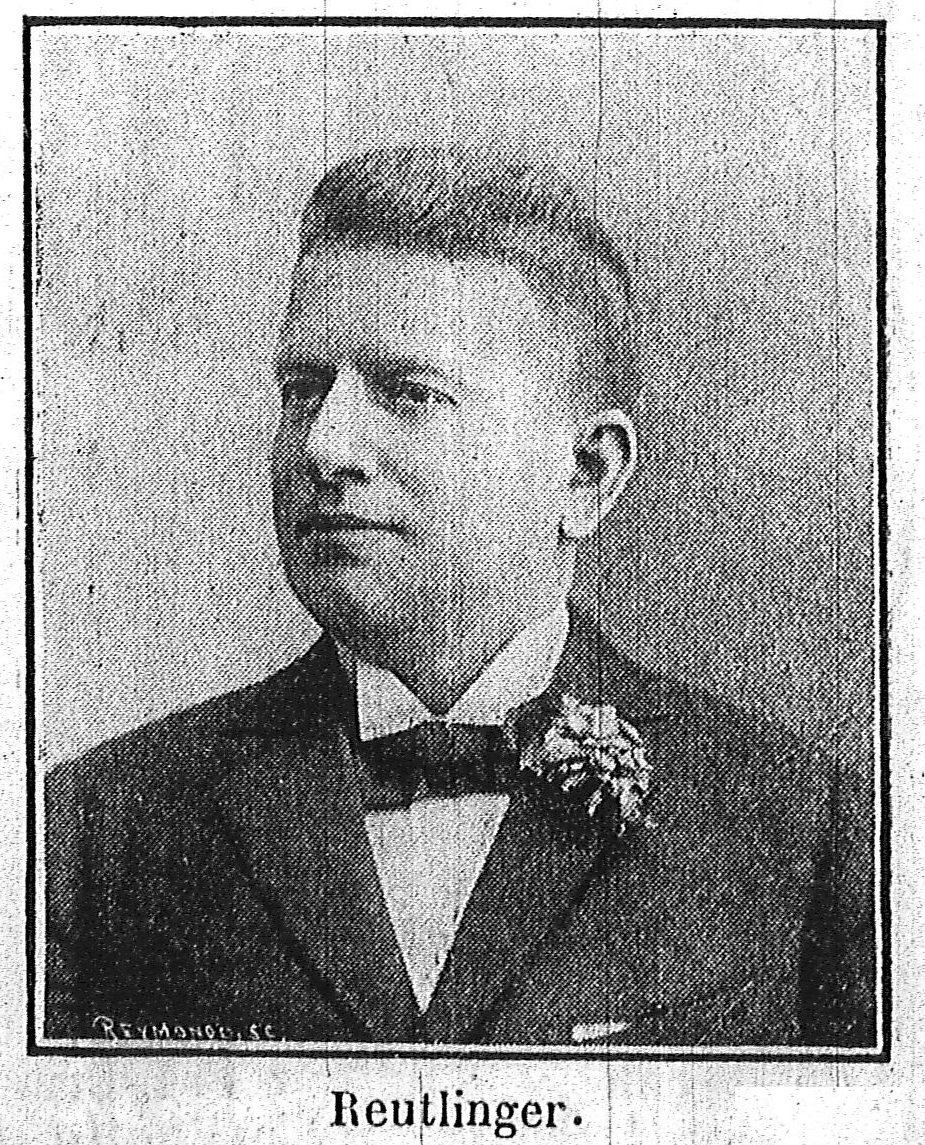 issu du fonds iconographique de la bibliothèque de Reims.